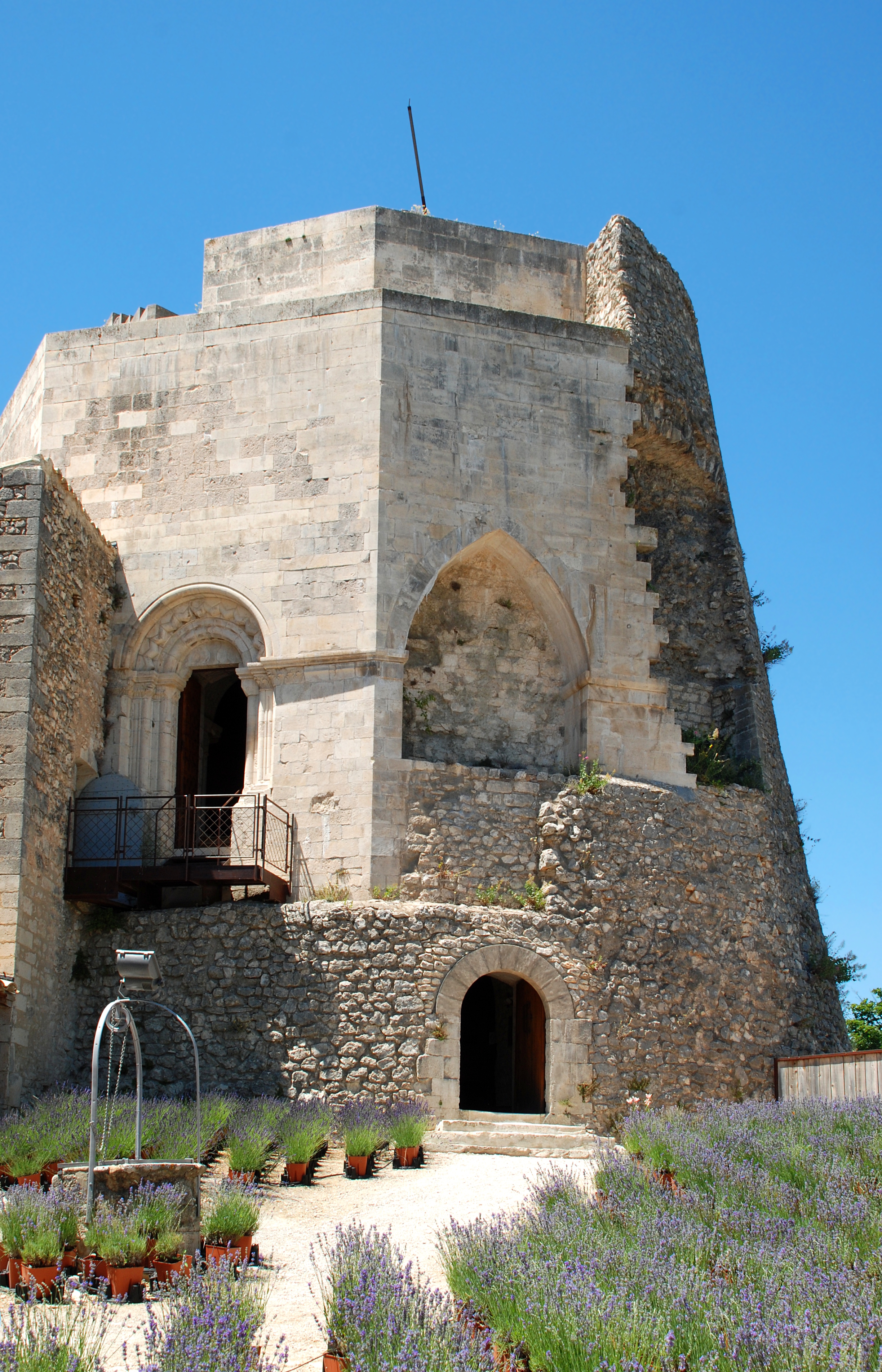 France - Provence - Château de Simiane-la-Rotonde